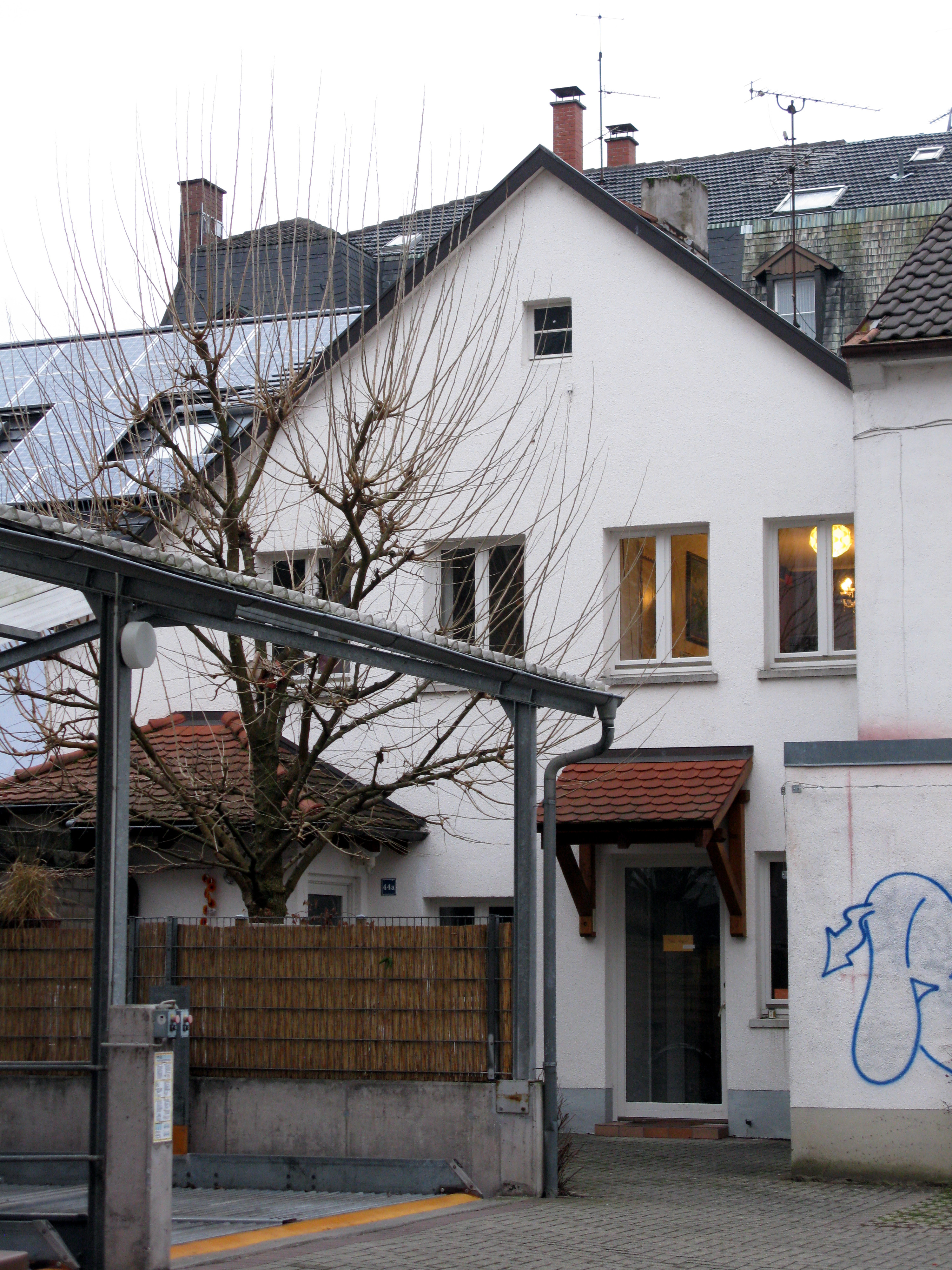 Freiburg, Günterstalstraße 44a, Sitz des Verlags orange-press